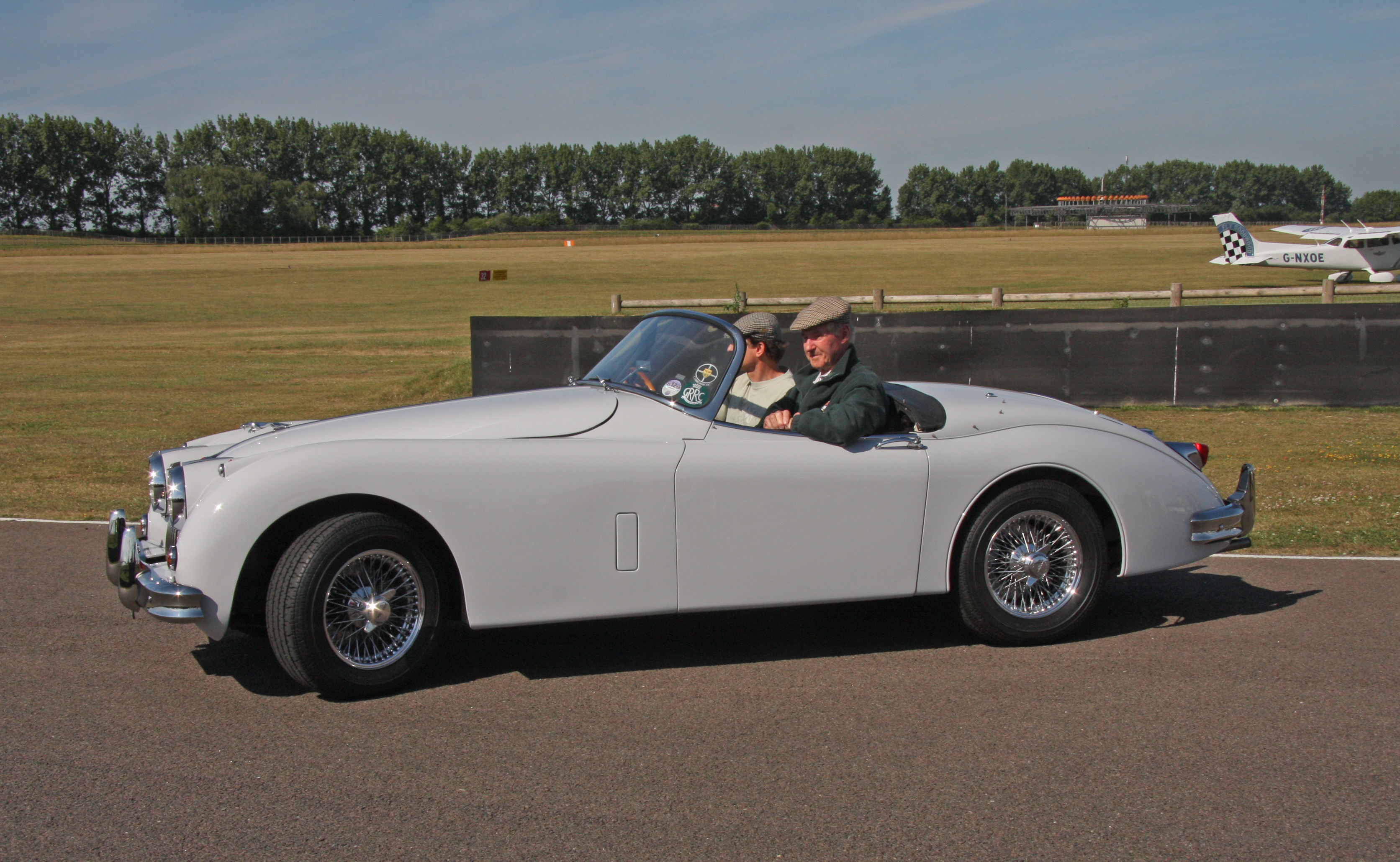 Jaguar XK 150